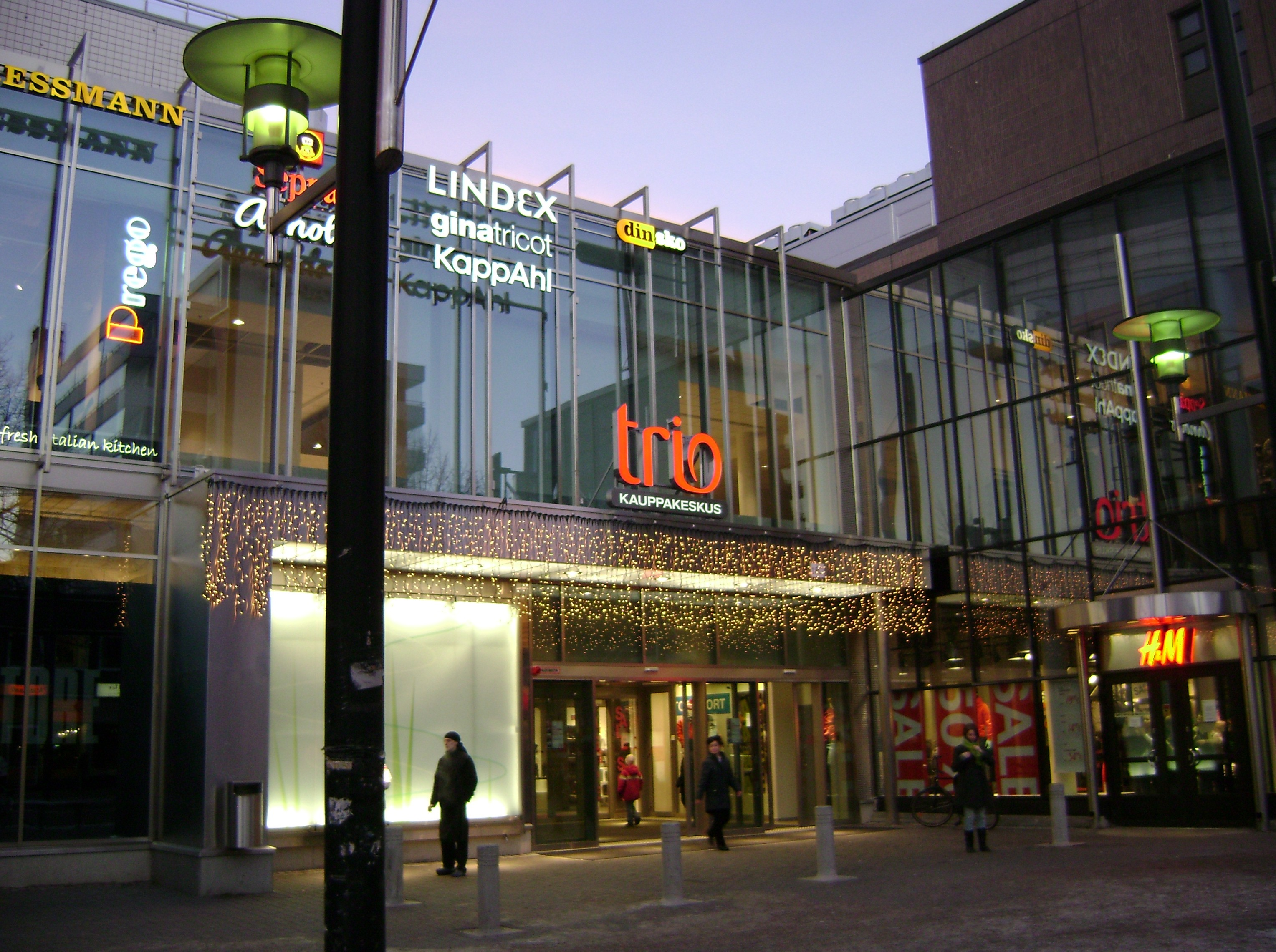 Kauppakeskus Trion sisäänkäynti Aleksanterinkadulla Lahdessa.